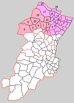 三重県鈴鹿郡の町村制時点の町村。